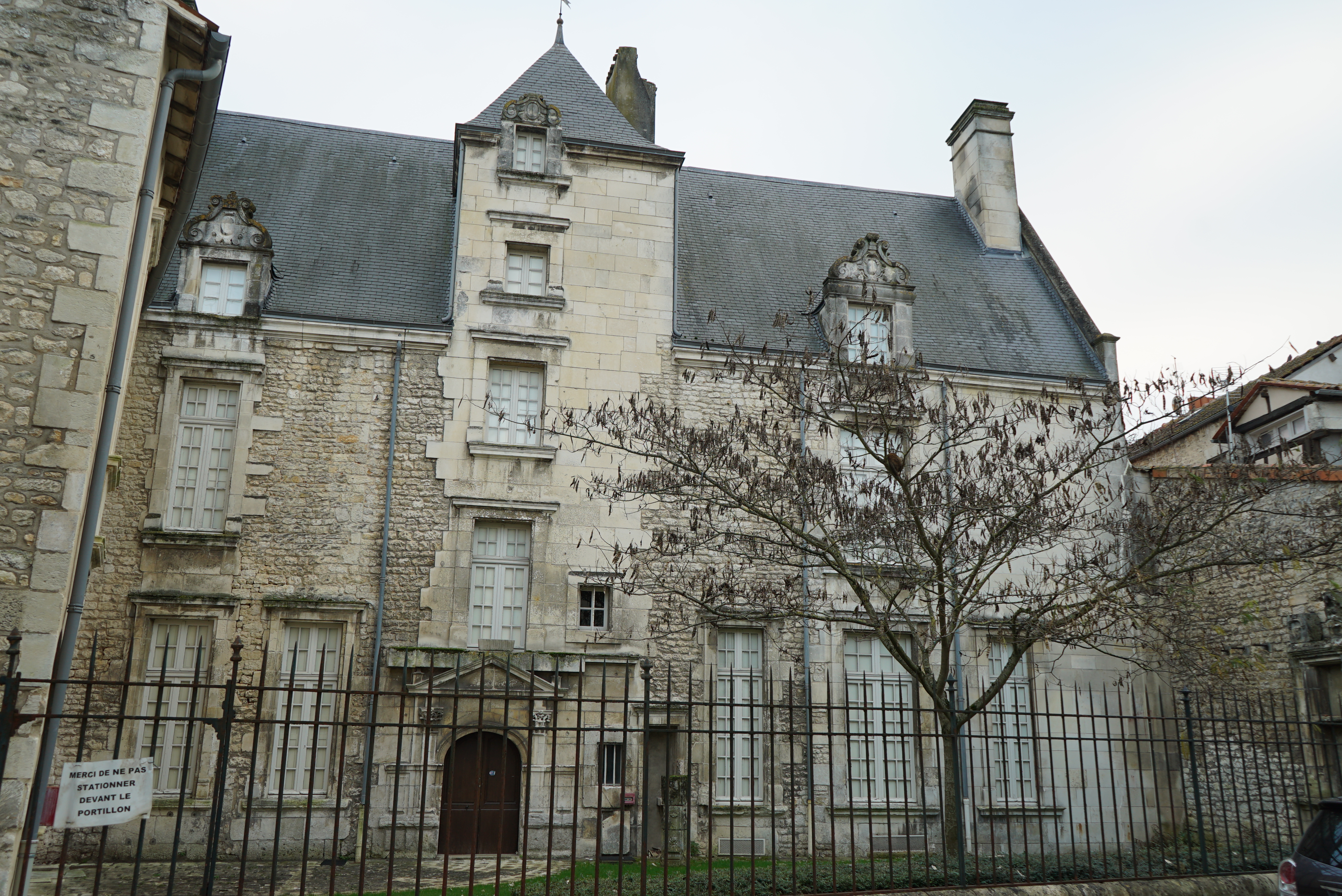 façade rue André Lemoine à Saintes, France.